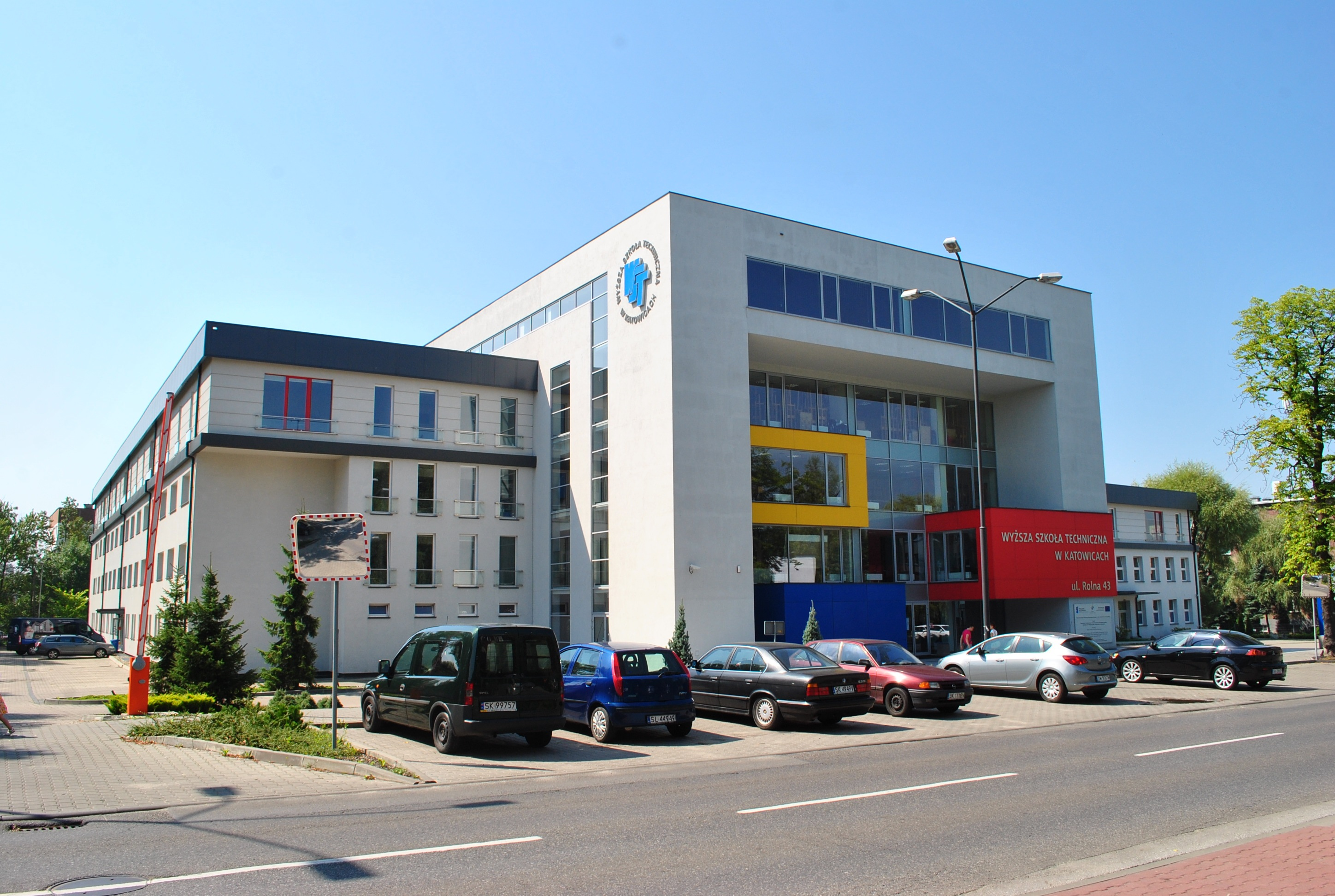 Katowice - Brynów. Siedziba Wyższej Szkoły Technicznej przy ul. Rolnej